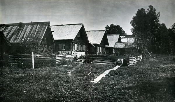 Komarov skit of Old Believers (Комаровский скит)